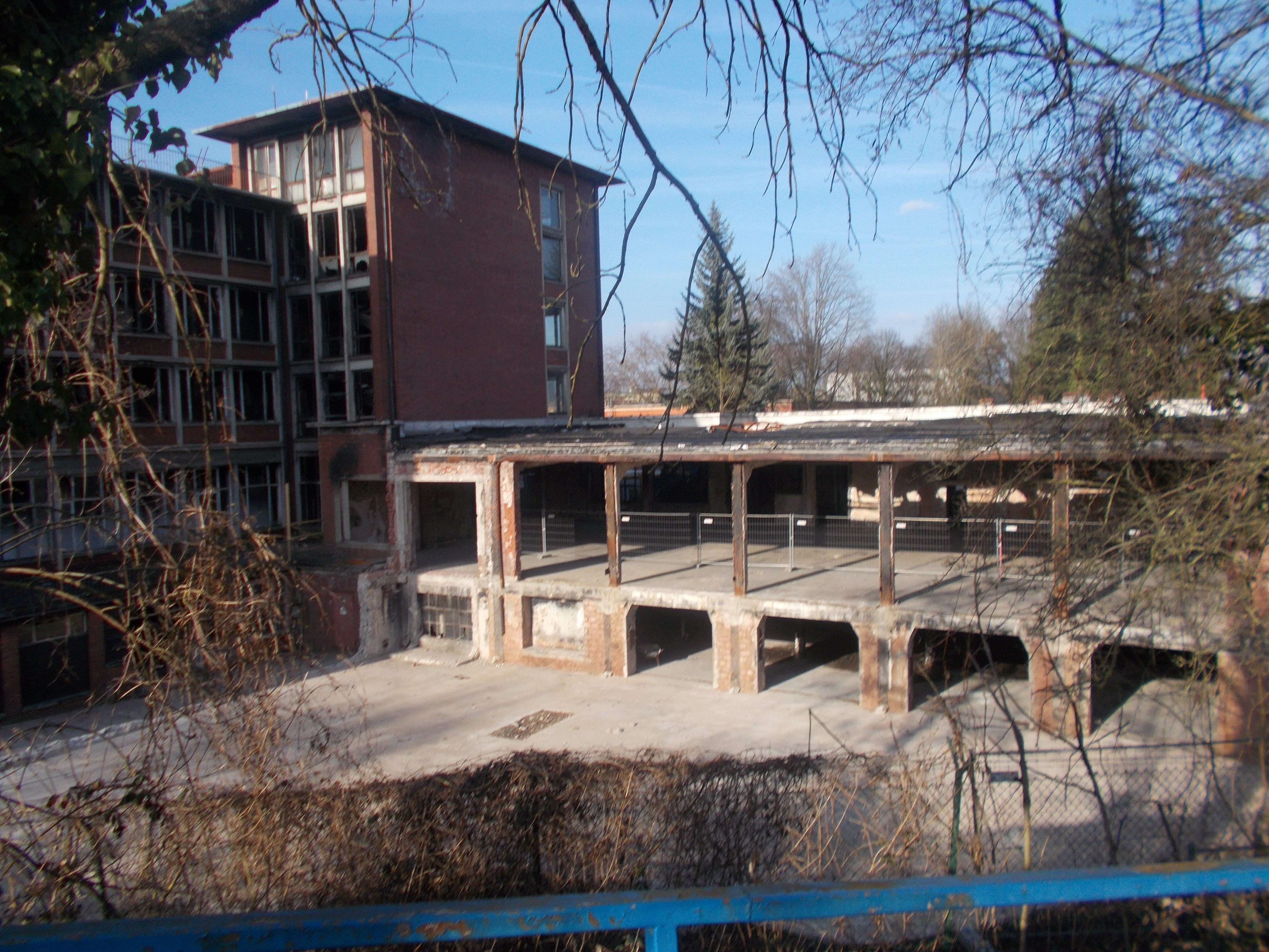 Verwaltungsgebäude, Pfaffwerk Kaiserslautern